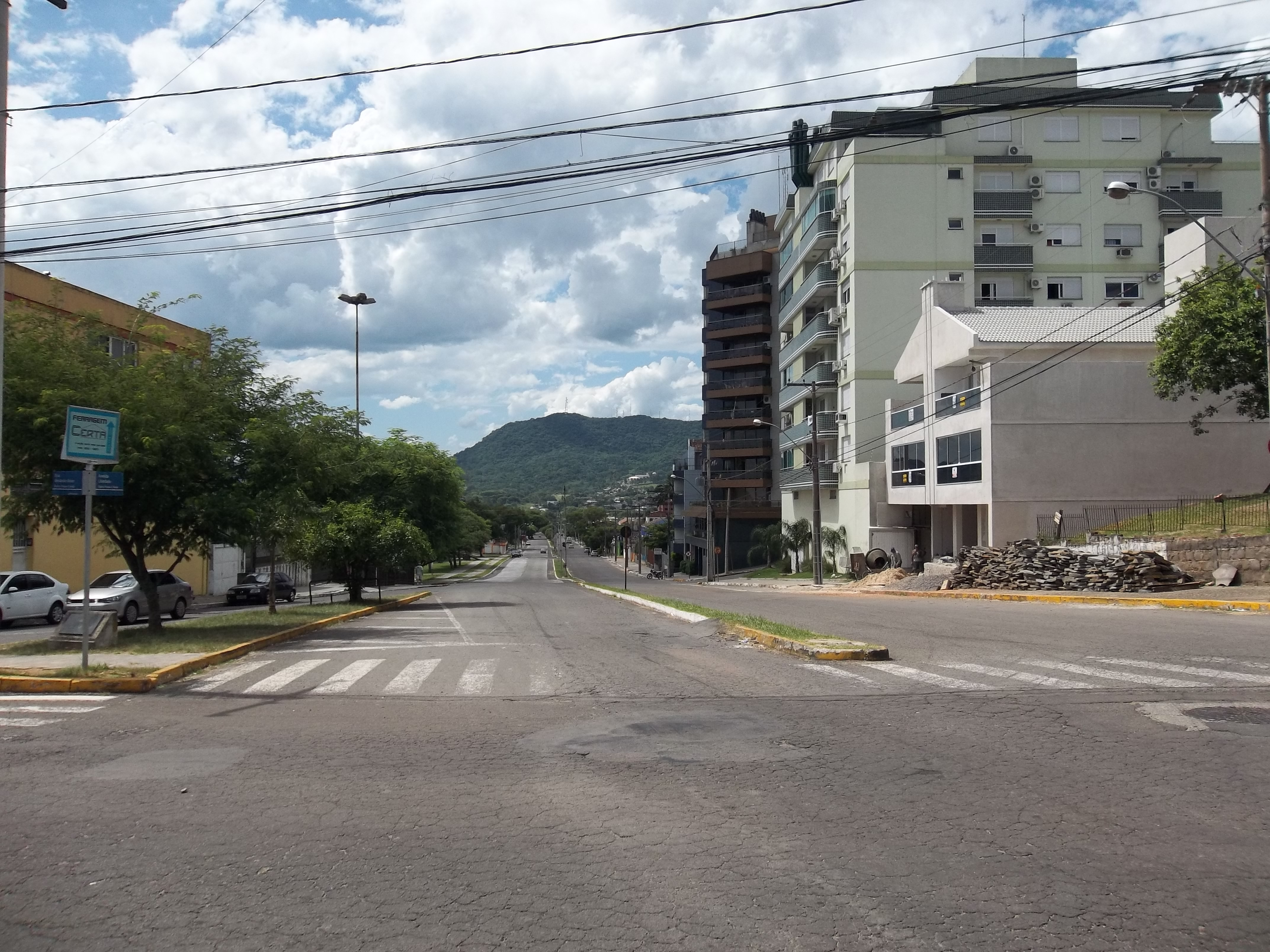 Avenida Liberdade esq. Rua Venâncio Aires. Passo d'Areia, Sede, Santa Maria, Rio Grande do Sul, Brasil